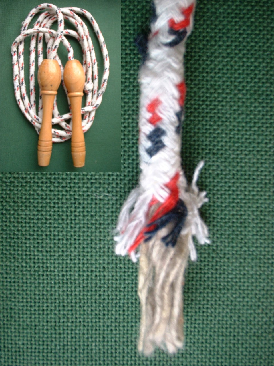 Springseil